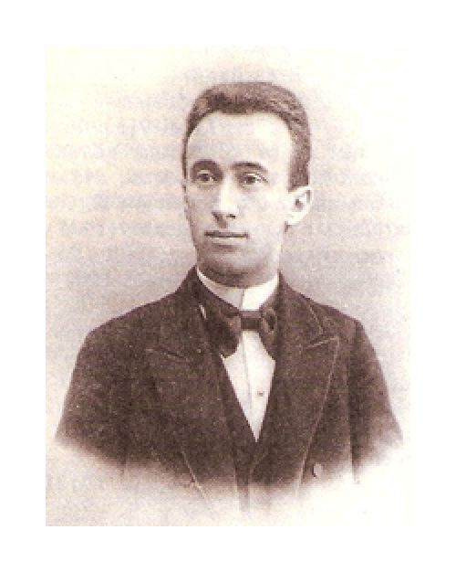 Волынский Аким Львович (Хаим Лейбович Флексер; 1861-1926) – историк и теоретик искусства, критик.